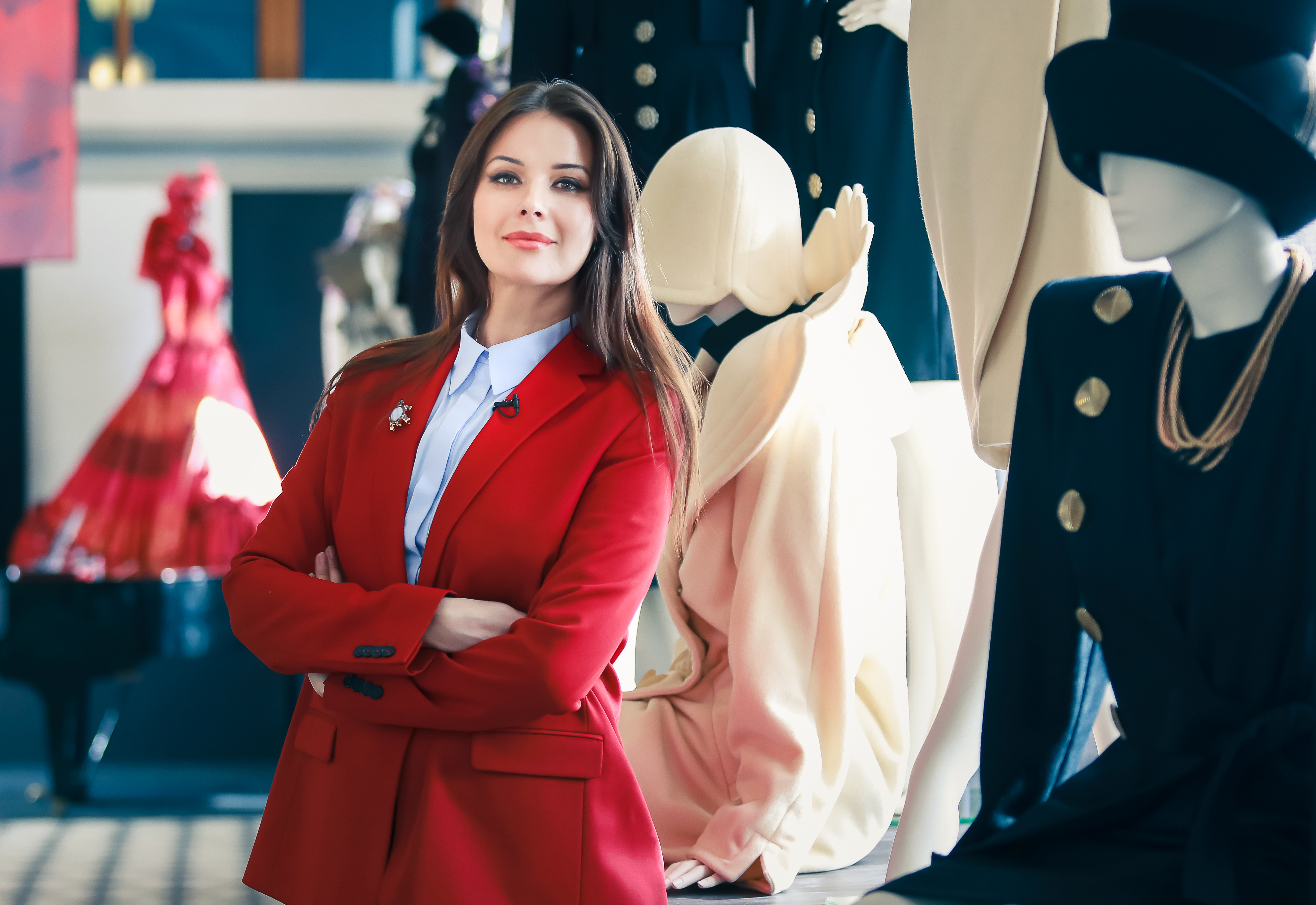 Телеведущая Оксана Фёдорова (директор Музея моды) в московском Музее моды.